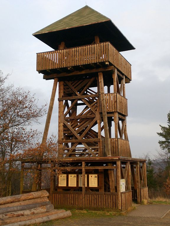 Pferdebergturm auf dem Pferdeberg bei Duderstadt (Germany)